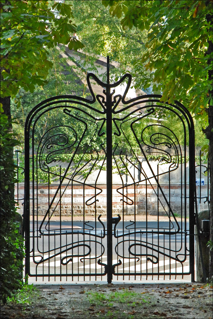 Vue du portail en fer forgé depuis l'intérieur Certaines formes de ce portail rappellent celles de la porte d'entrée du castel Béranger mais le dessin reste symétrique comme l'est celui de la façade principale de la villa. ______________________ La Hublotière est une propriété privée (architecte Hector Guimard, 1896) Première villa Art Nouveau de Guimard, cette construction est contemporaine du Castel Béranger voir l'album du Castel Béranger Site officiel de la Hublotière